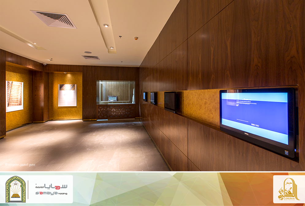 صورة من قاعة الوداع